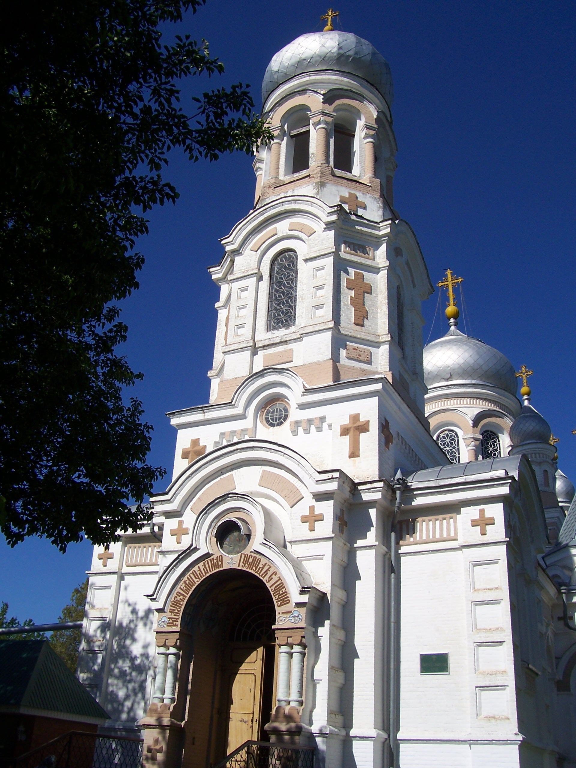 Свято-Успенский собор Русской православной церкви.